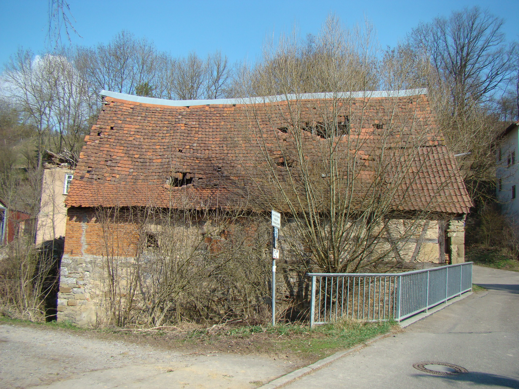 Nebengebäude der alten Mühle in HN-Biberach. Foto: März 2012